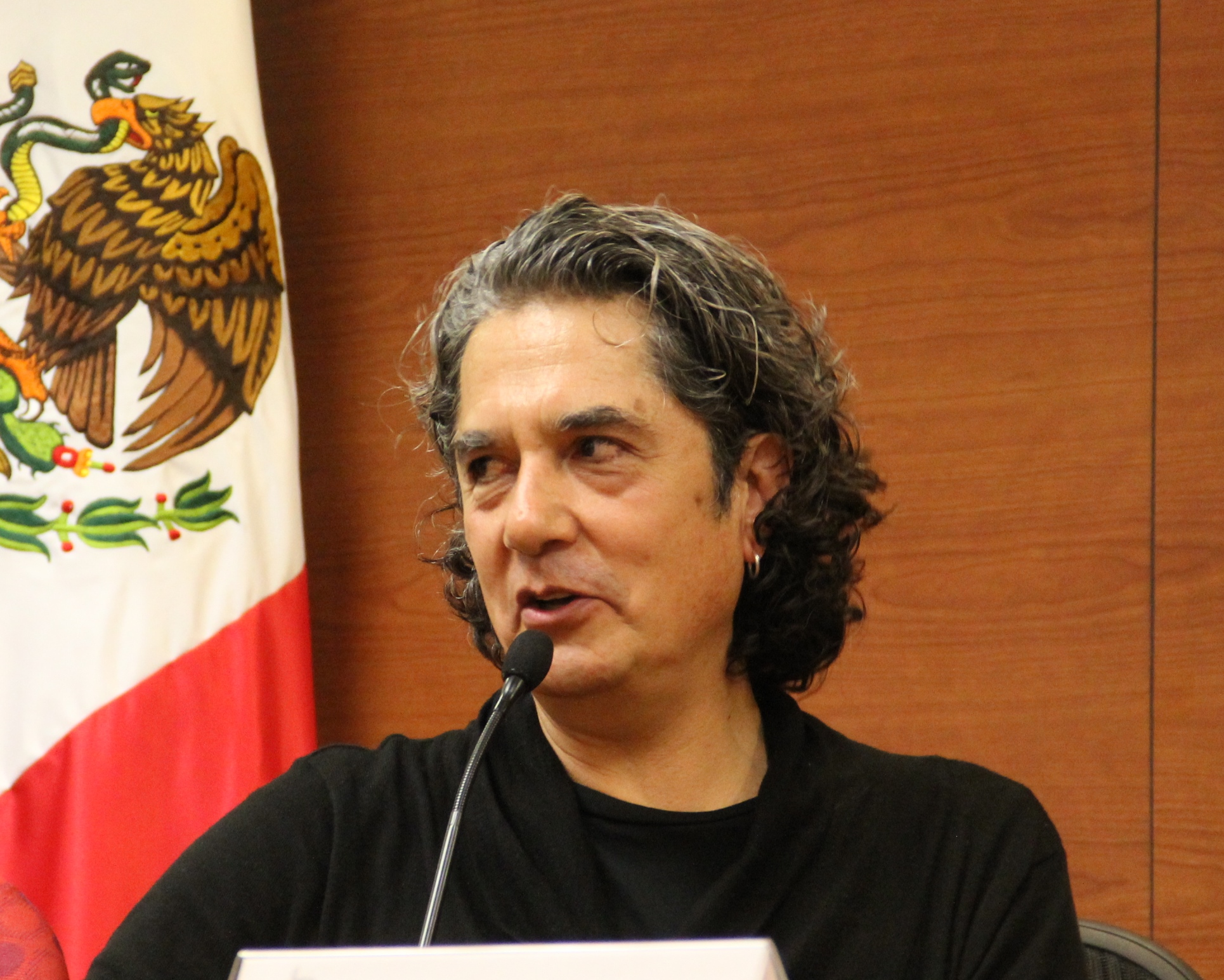 Armando Vega-Gil en el segundo Coloquio Internacional “Nuevas narrativas mexicanas: desde la diversidad” en el ITESM-Campus Ciudad de Mexico